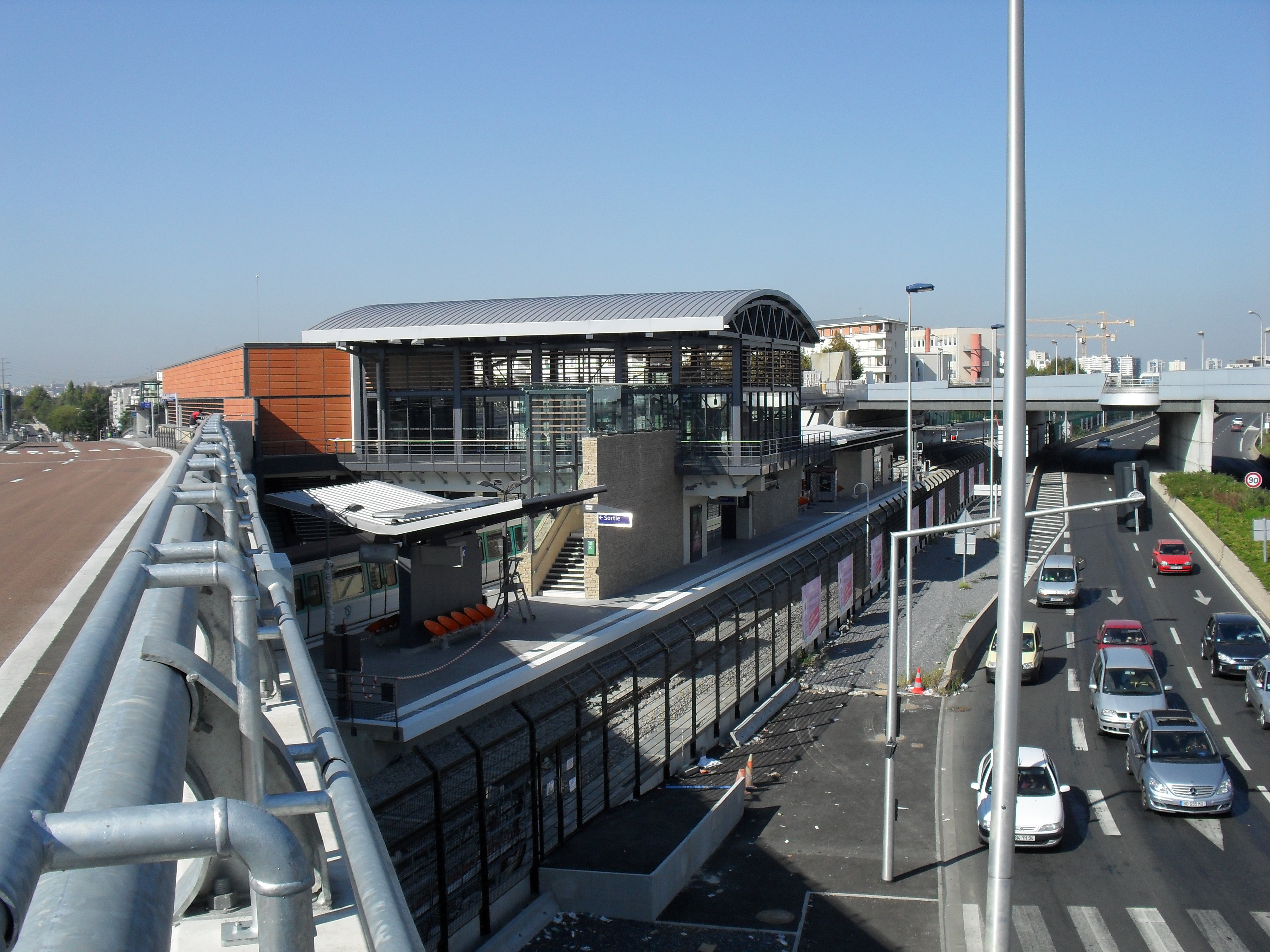 La nouvelle station métro de Créteil : Pointe du Lac, à une semaine de son ouverture au public.